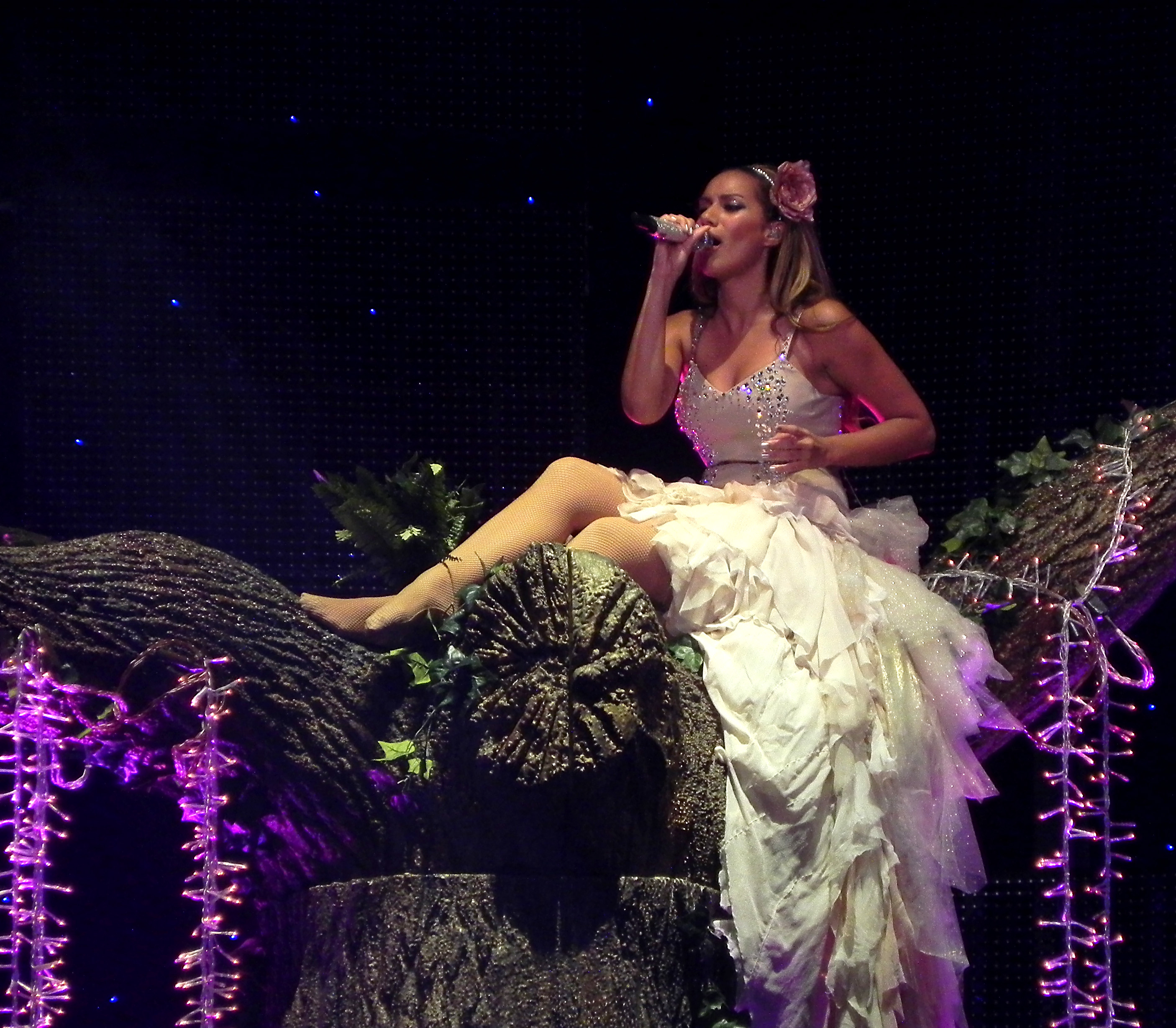 Leona Lewis durante a sua turnê "The Labyrinth" (em português: O Labirinto)